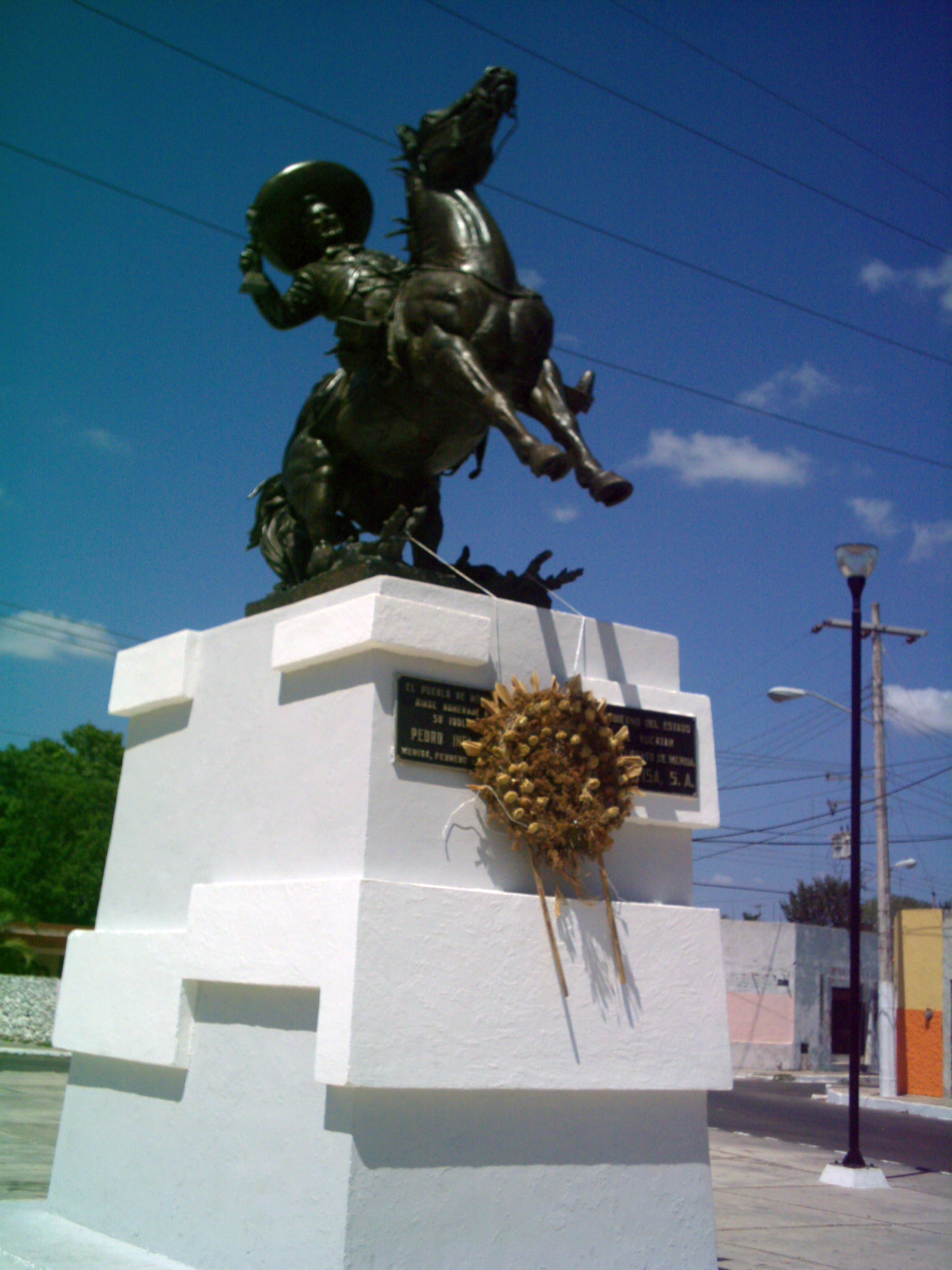 Estatua ecuestre a Pedro Infante Cruz en la vía pública en un parque de Mérida, Yucatán, la obra de arte es de autor desconocido